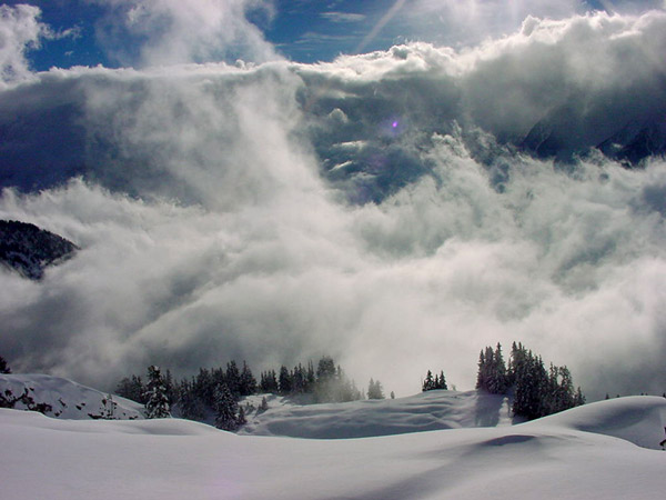 Winterlandschaft Fotografiert am: 30.12.2001, 11:56 (Belalp) Copyright Status: GNU Freie Dokumentationslizenz